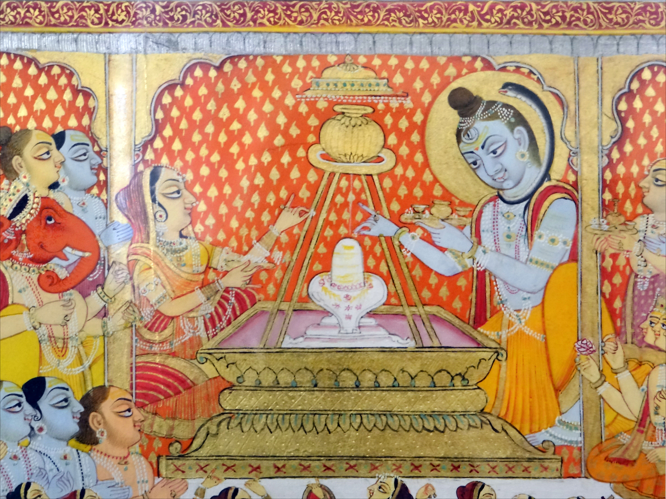 Peinture murale représentant le Dieu Shiva dans le Palais du Fort Meherangarh à Jodhpur (Au centre, le linga ou lingam associé au yoni, le linga est la forme incarnée de Shiva) XVIIIème siècle (?) Le style rajput, arrivé à maturité au XVIIème et début du XVIIIème siècle, est une synthèse entre le style hindou et l'art islamique moghol (ce dernier étant lui-même d'origine persane). Les alliances passées entre les clans rajputs et les moghols qui ont envahi l'Inde du nord à partir de 1526 (Bâbur est le fondateur de la dynastie) en sont à l'origine. Le fort de Mehrangarh de Jodhpur, ville située dans l'État du Rajasthan (Inde), est l'un des plus imposants forts que compte l'Inde. Surnommé le fort magnifique, il surplombe la ville du haut de ses 122 mètres. À l'intérieur de celui-ci se trouve un palais richement décoré et agrémenté de nombreuses cours. Extrait de l'article de Wikipedia sur le fort Meherangarh